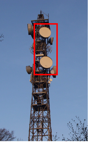 Raumdiversität mit zwei, räumlich übereinander am Gittermast angebrachten Richtfunkantennen (rotes Rechteck) auf einen Sendemast in Weiterstadt, Hessen, Deutschland Durch Bodenreflexionen kann es bei der Richtfunkstrecke zu unterschiedlichen Empfangspegeln an den beiden übereinander angebrachten und parallel betriebenen Empfangsantennen kommen.